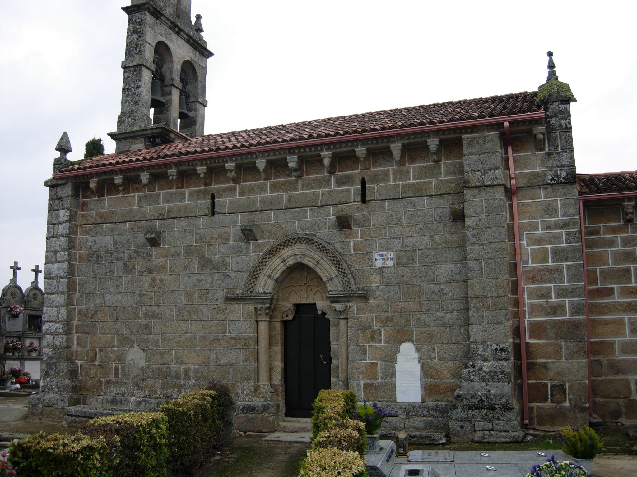 Iglesia de Santa María de Feá - Toén - Ourense